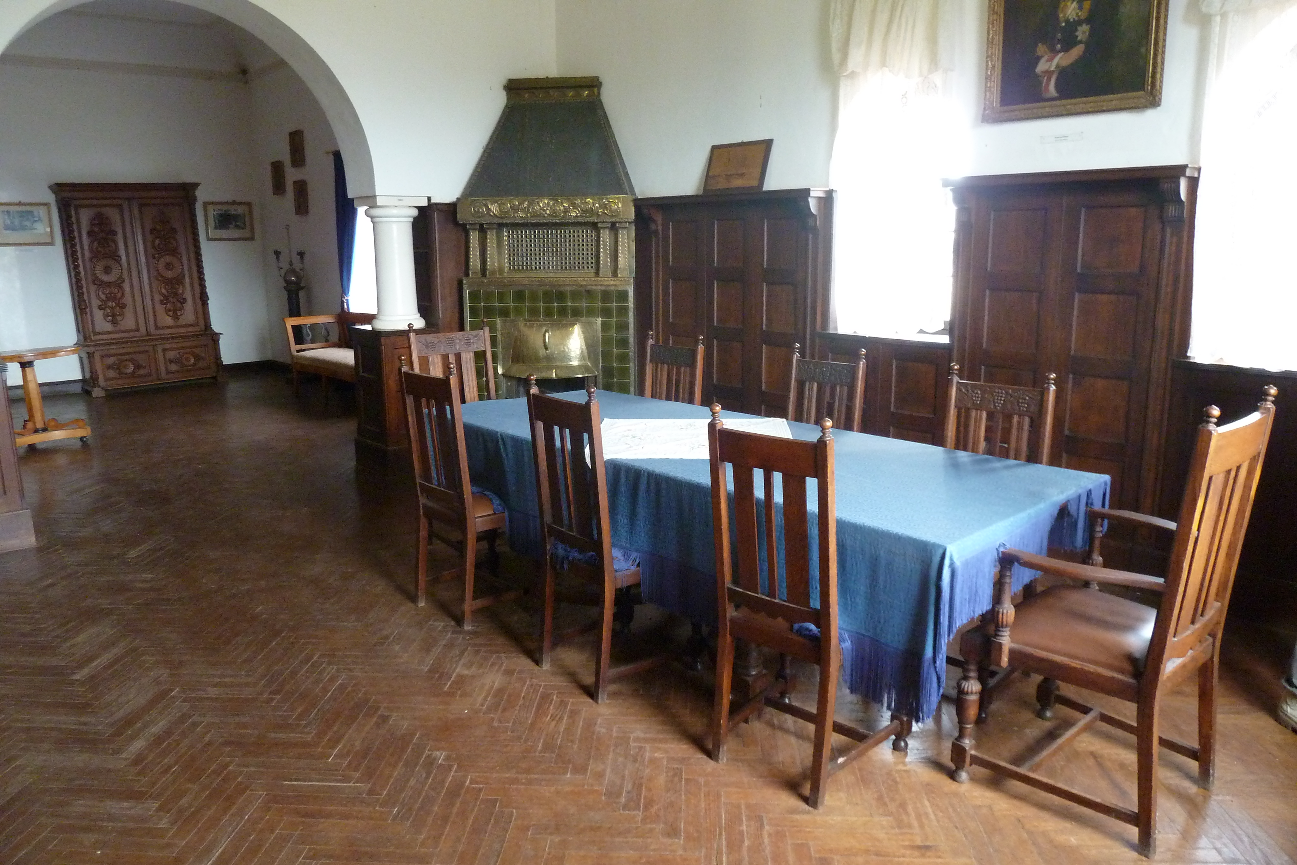 Speisezimmer Schloss Duwisib, Namibia